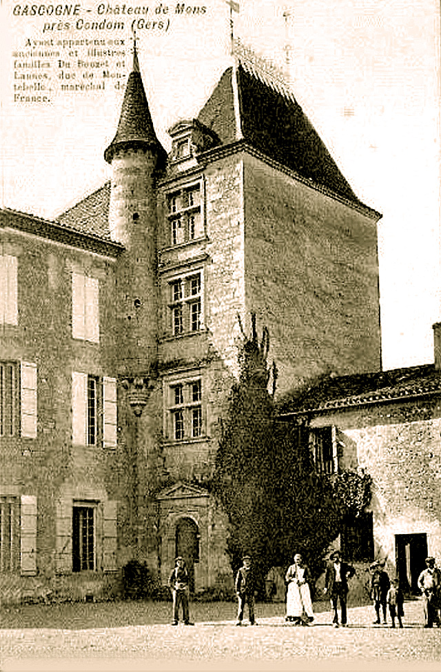 Château de Mons (Gers), conservatoire des cépages du patrimoine biologique régional Midi-Pyrénées